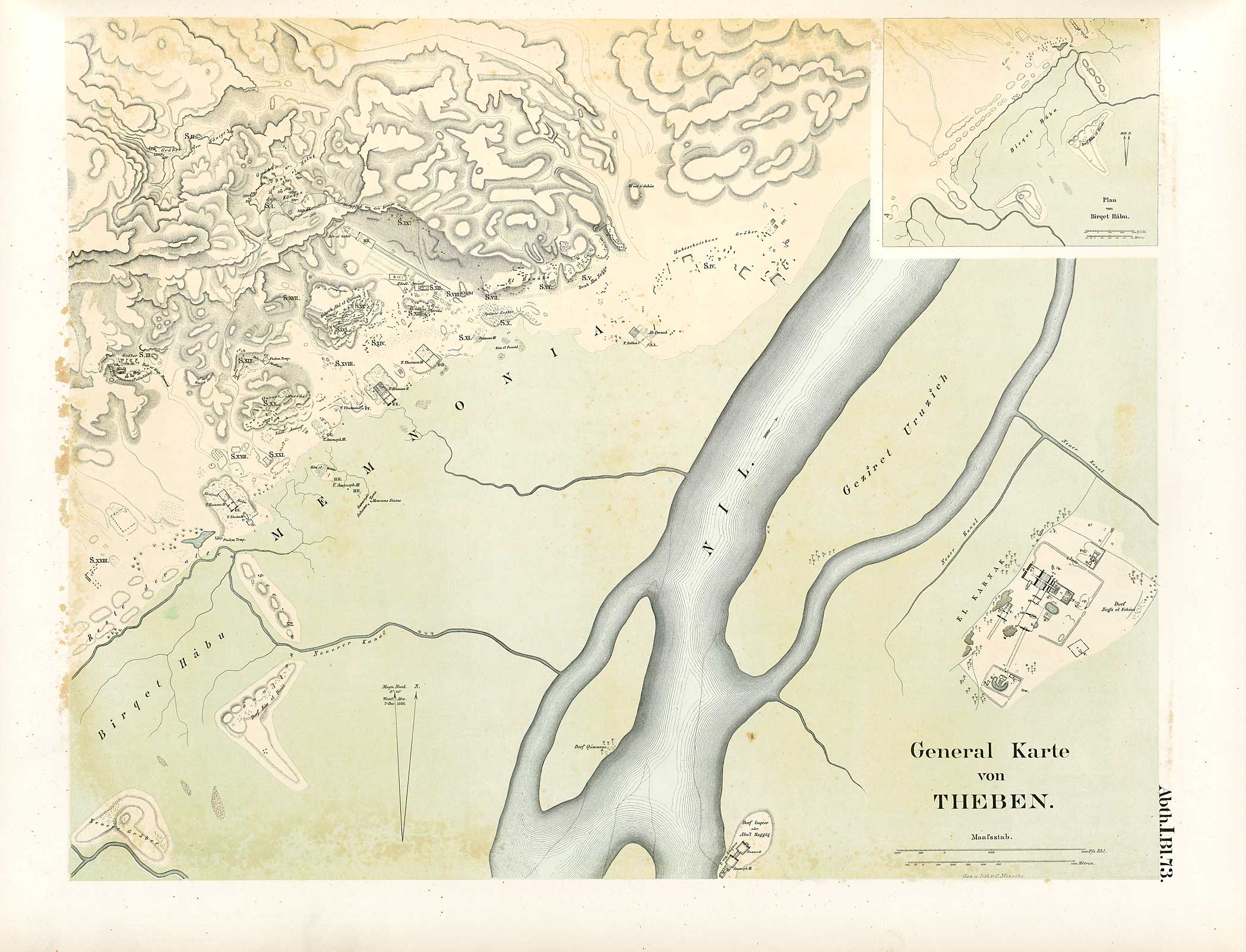 Denkmaeler aus Aegypten und Aethiopien nach den Zeichnungen der von Seiner Majestät dem Koenige von Preussen, Friedrich Wilhelm IV., nach diesen Ländern gesendeten, und in den Jahren 1842–1845 ausgeführten wissenschaftlichen Expedition auf Befehl Seiner Majestät